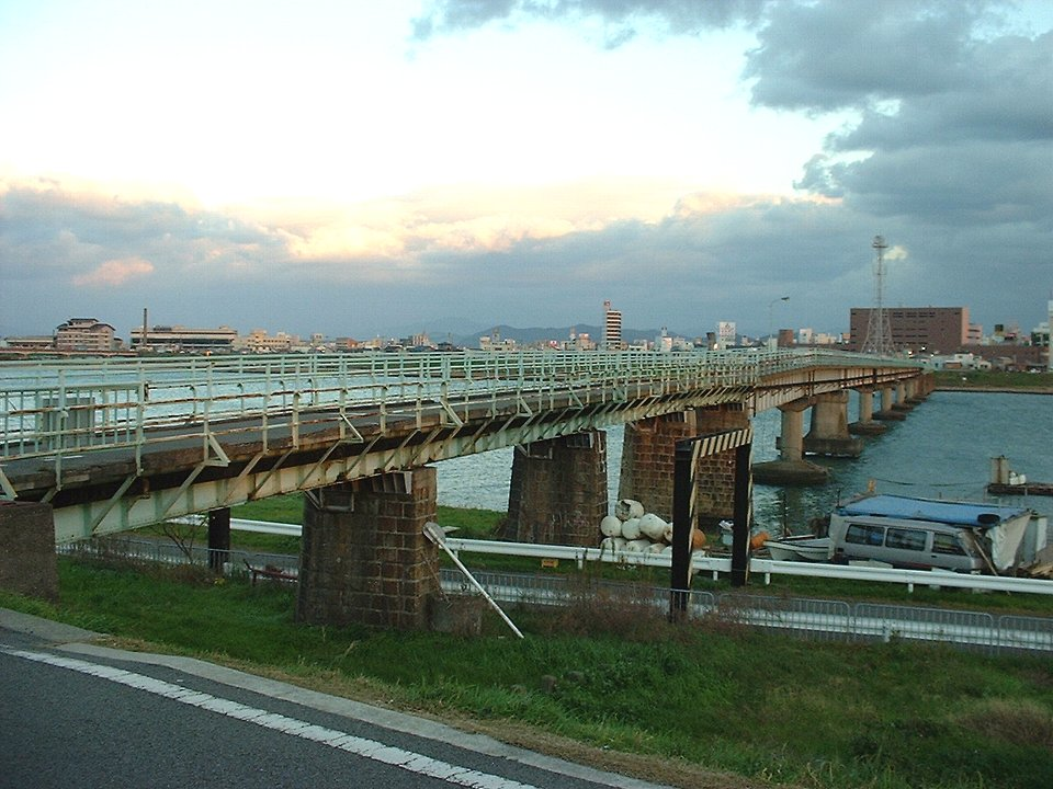 紀の川にかかる河西橋（旧・南海加太線紀ノ川橋梁） 橋脚が傾いている